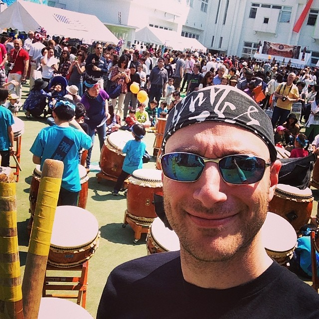 Taiko Selfie